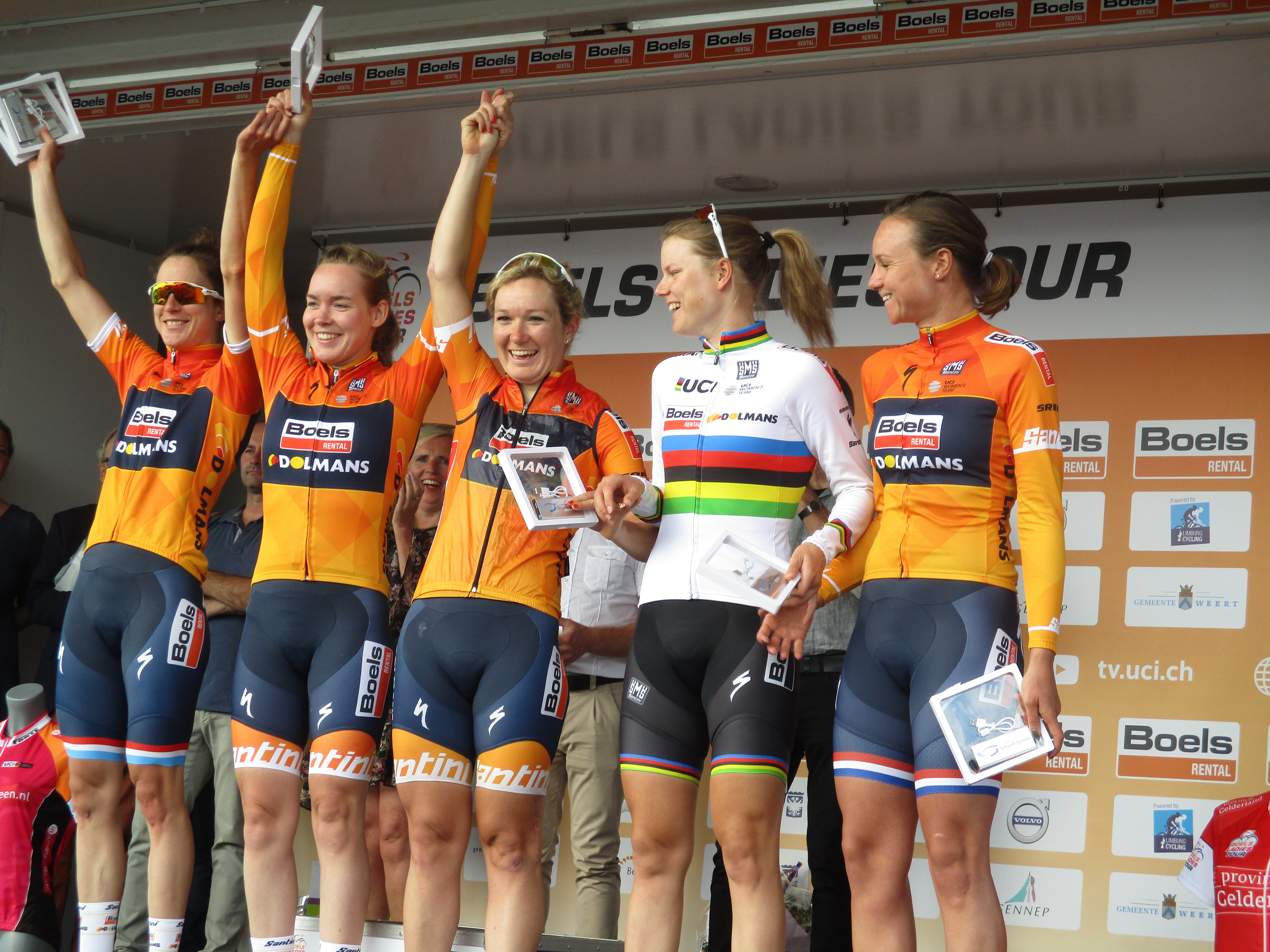 Huldiging van de winnaars van de Boels Ladies Tour 2017 op het Tom Dumoulin Bike Park in Sittard-Geleen.